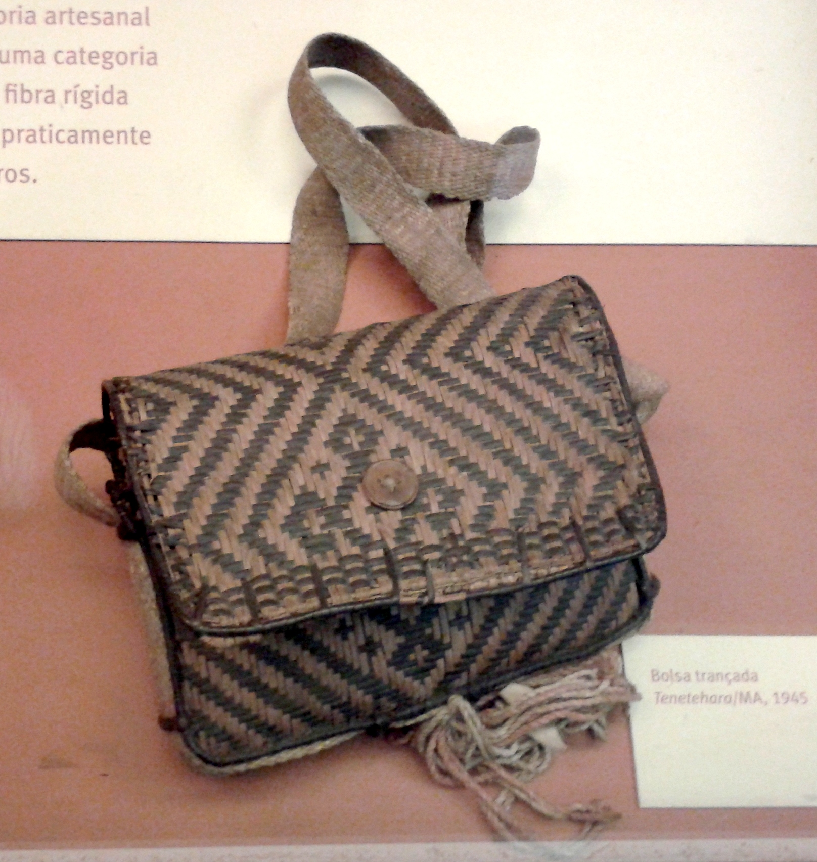 Português do Brasil: Bolsa trançada - Índios Tenetehara, Maranhão, 1945. Acervo de etnologia indígena brasileira do Museu Nacional/UFRJ, Rio de Janeiro, Brasil.